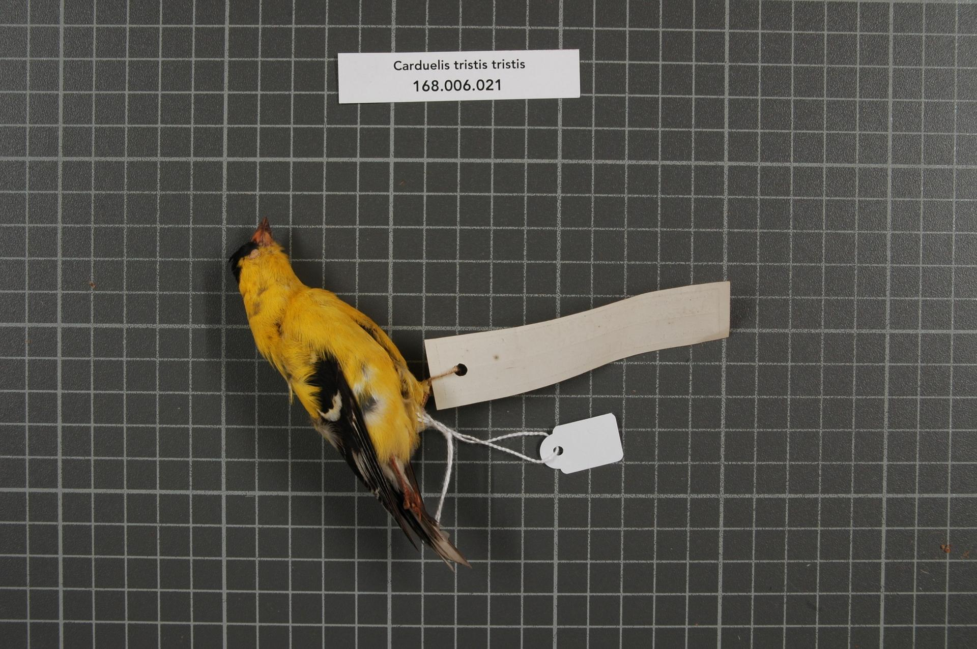 Carduelis tristis tristis (Linnaeus, 1758)